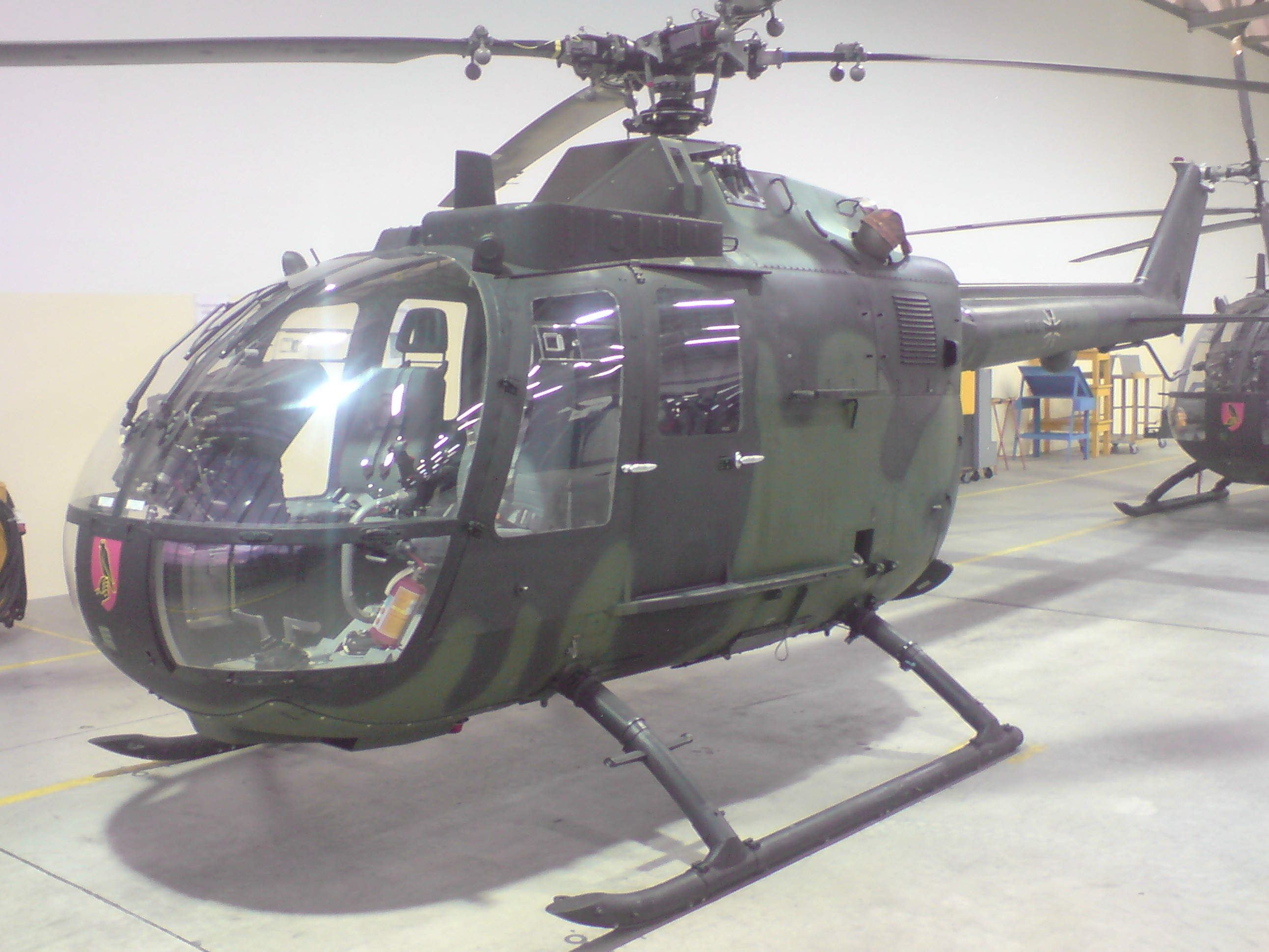 Bölkow Bo-105 P1 M des Heeresfliegerausbildungszentrum C in der Halle II des Heeresflugplatzes Celle